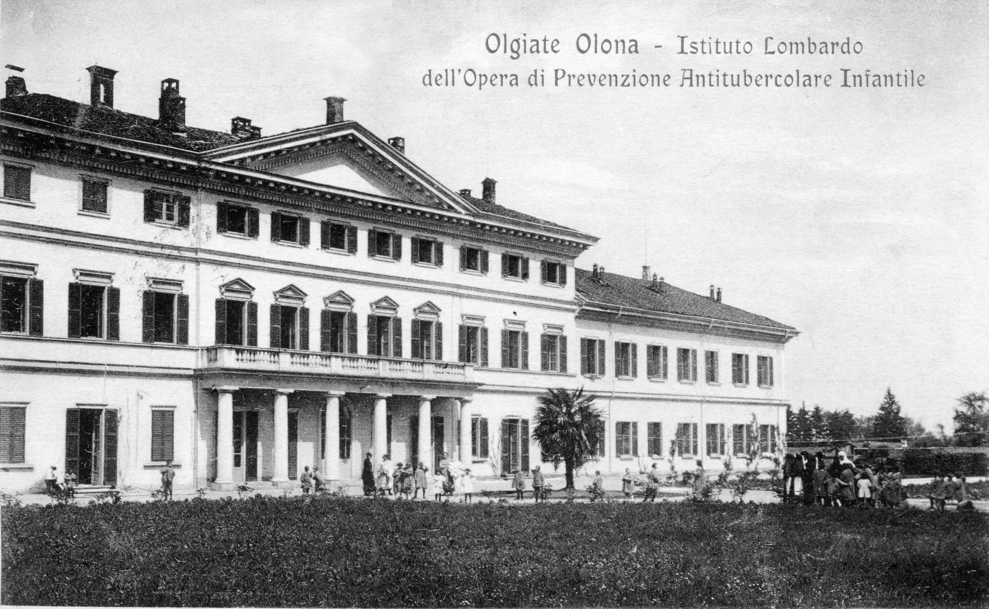 Anno 1919 Preventorio OPAI di Olgiate Olona